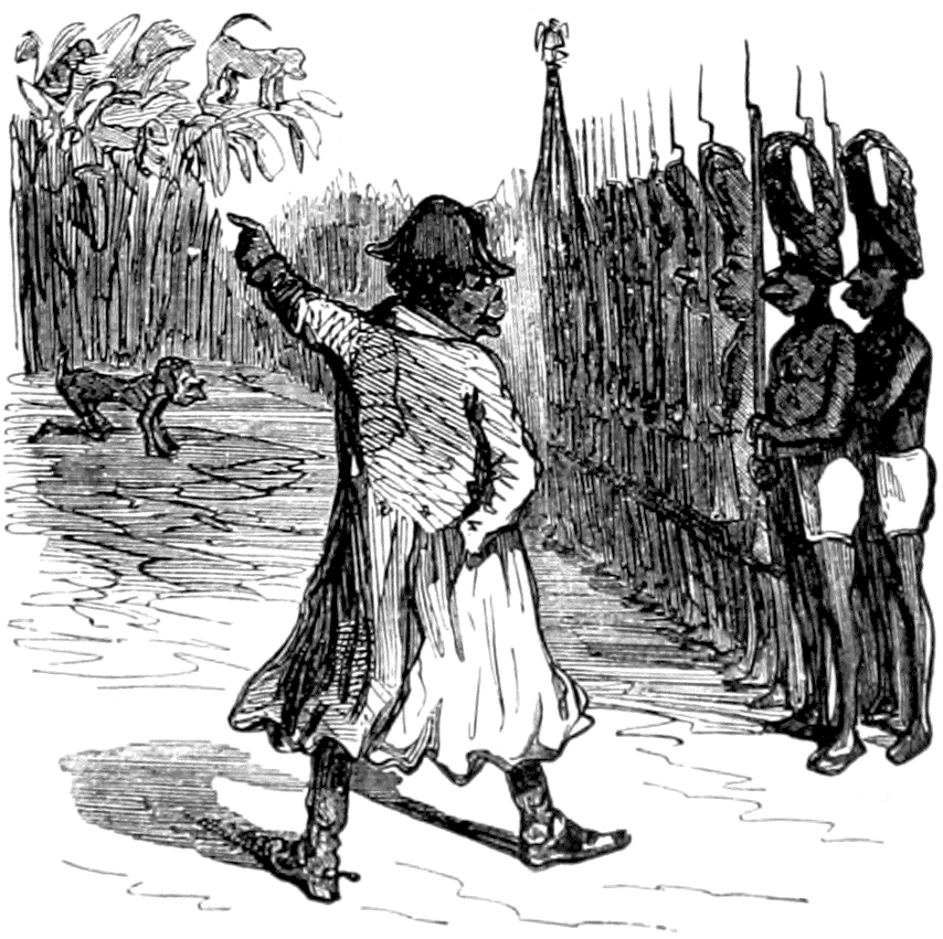 Frontispice de l’album "Soulouque et sa cour" — Attention, grenadiers, du haut de ces cocotiers quarante singes vous contemplent.